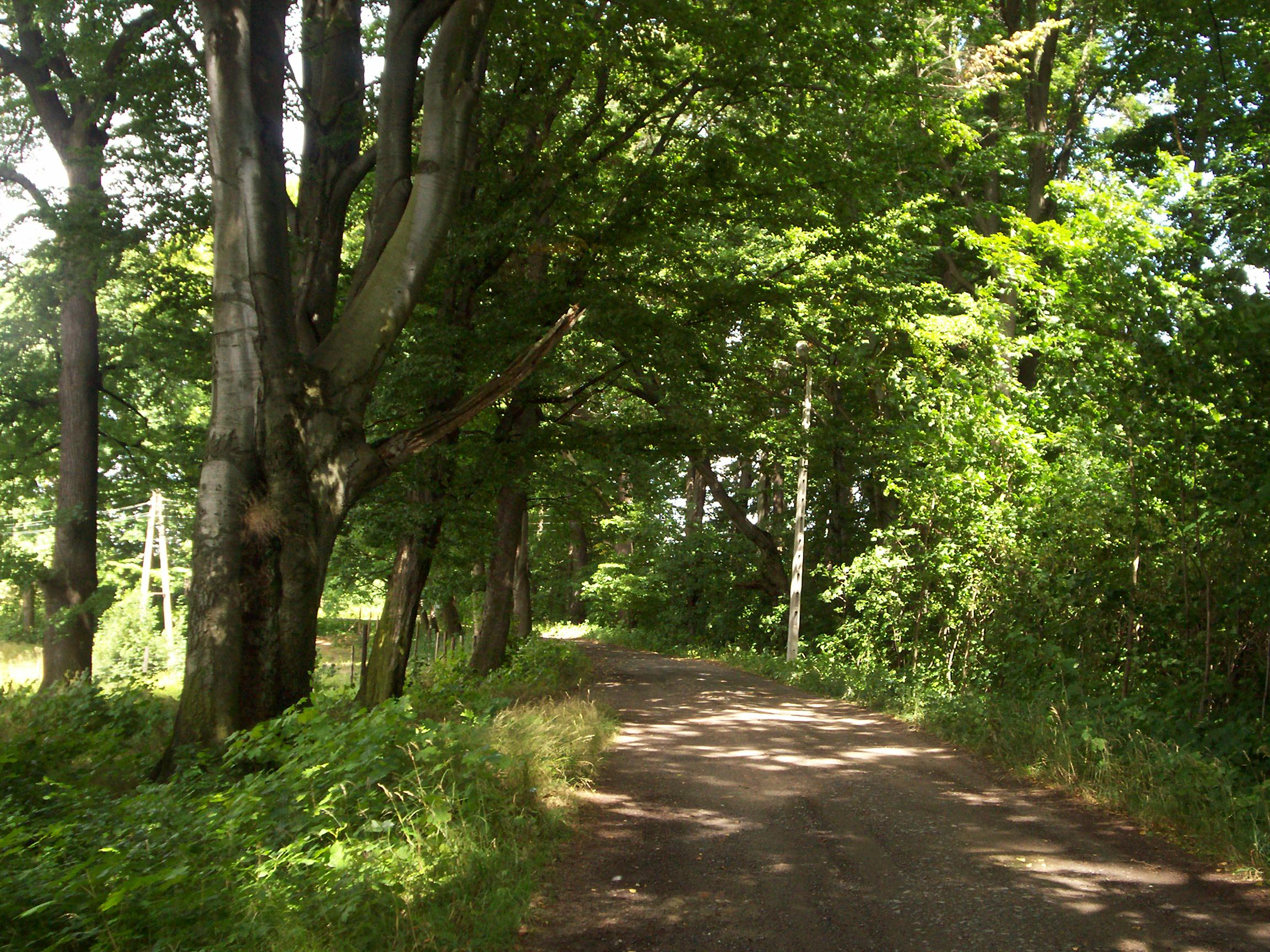 Maciejowiec, park pałacowy.